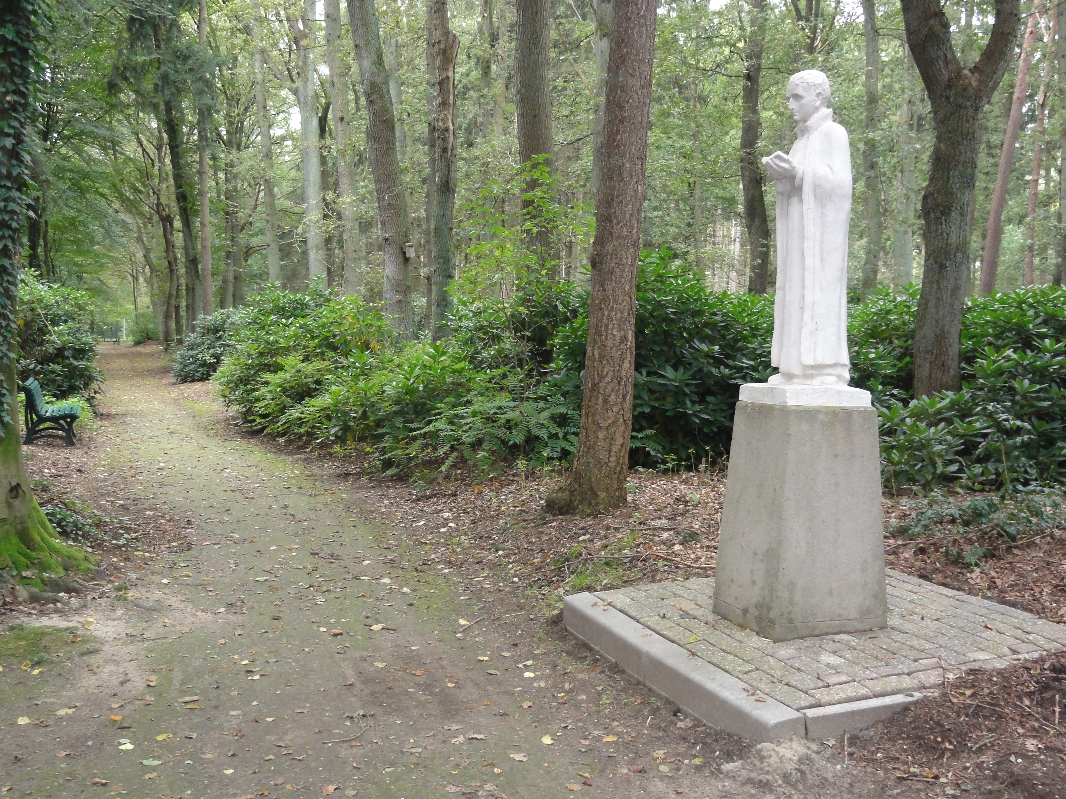 Nijmegen Rijksmonument 523017 Berchmanianum, laan in park met beeld St.Jan Berchmans 32″ N, 5° 51′ 55.72″ E